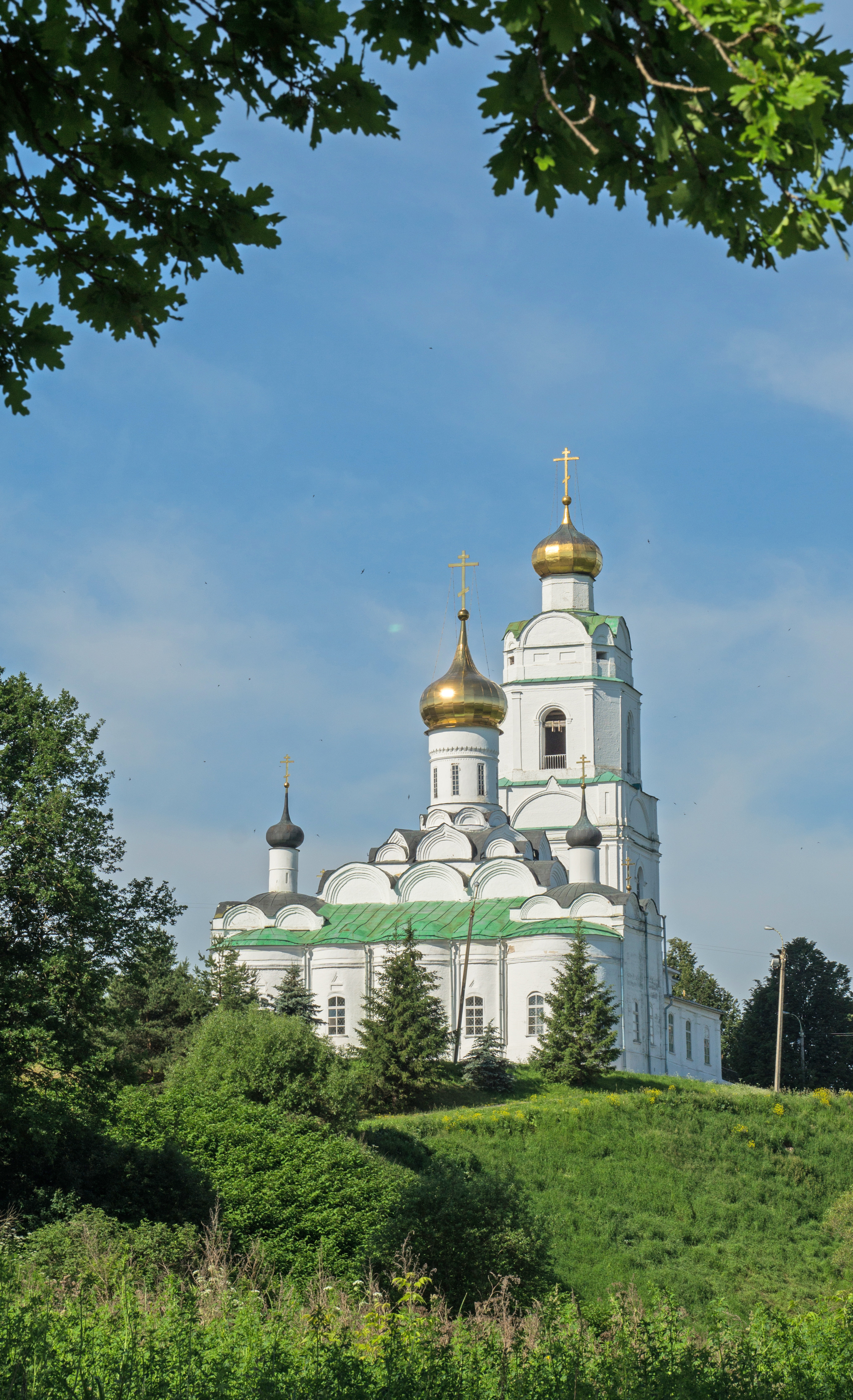 Троицкий собор: Нагорная улица, 2 (Соборная гора), Вязьма, Вяземский район, Смоленская область